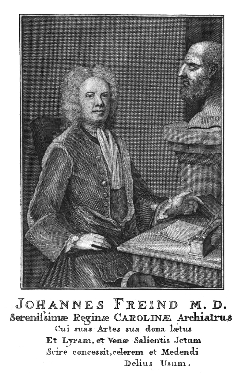 Portrait John Freind